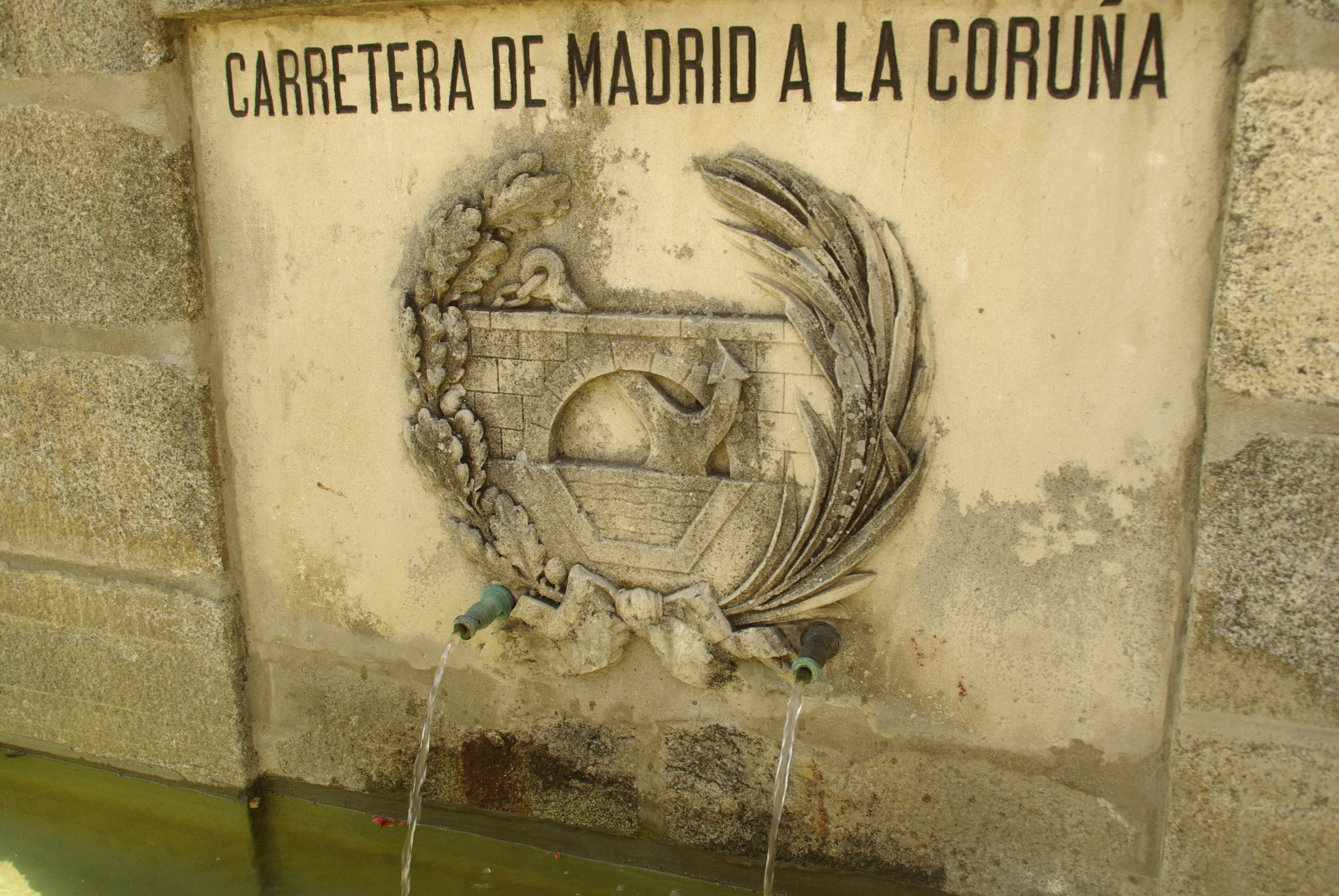 ® S.D. (ES,EN.) GUADARRAMA FUENTE URBANA